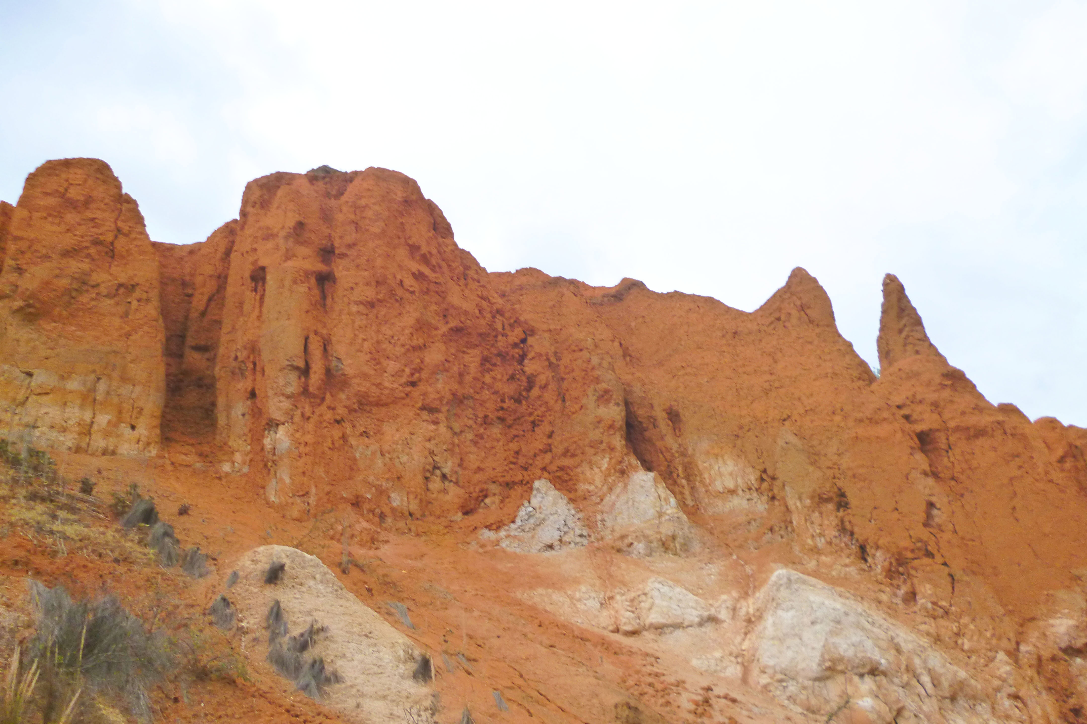 una de las lomas del árido sector de modoñedo cúndinamarca conocido como el desierto de sabrinsky